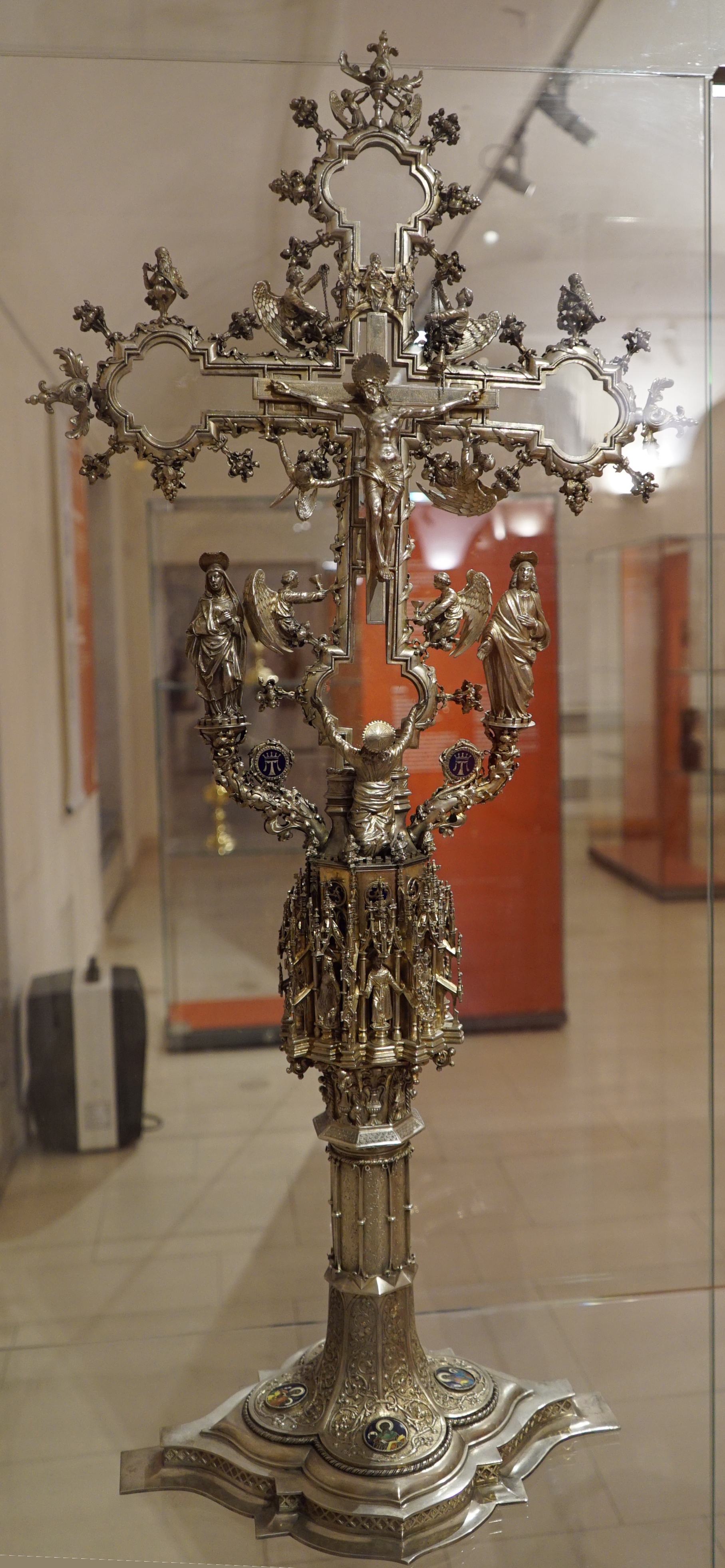 offert par le couple Chambrun à l'église st-Etienne de st-Mihiel, Adelbert était colonel en la garnison de la ville, en hommage à leur fille Suzanne ; présenté au musée de st-Mihiel.